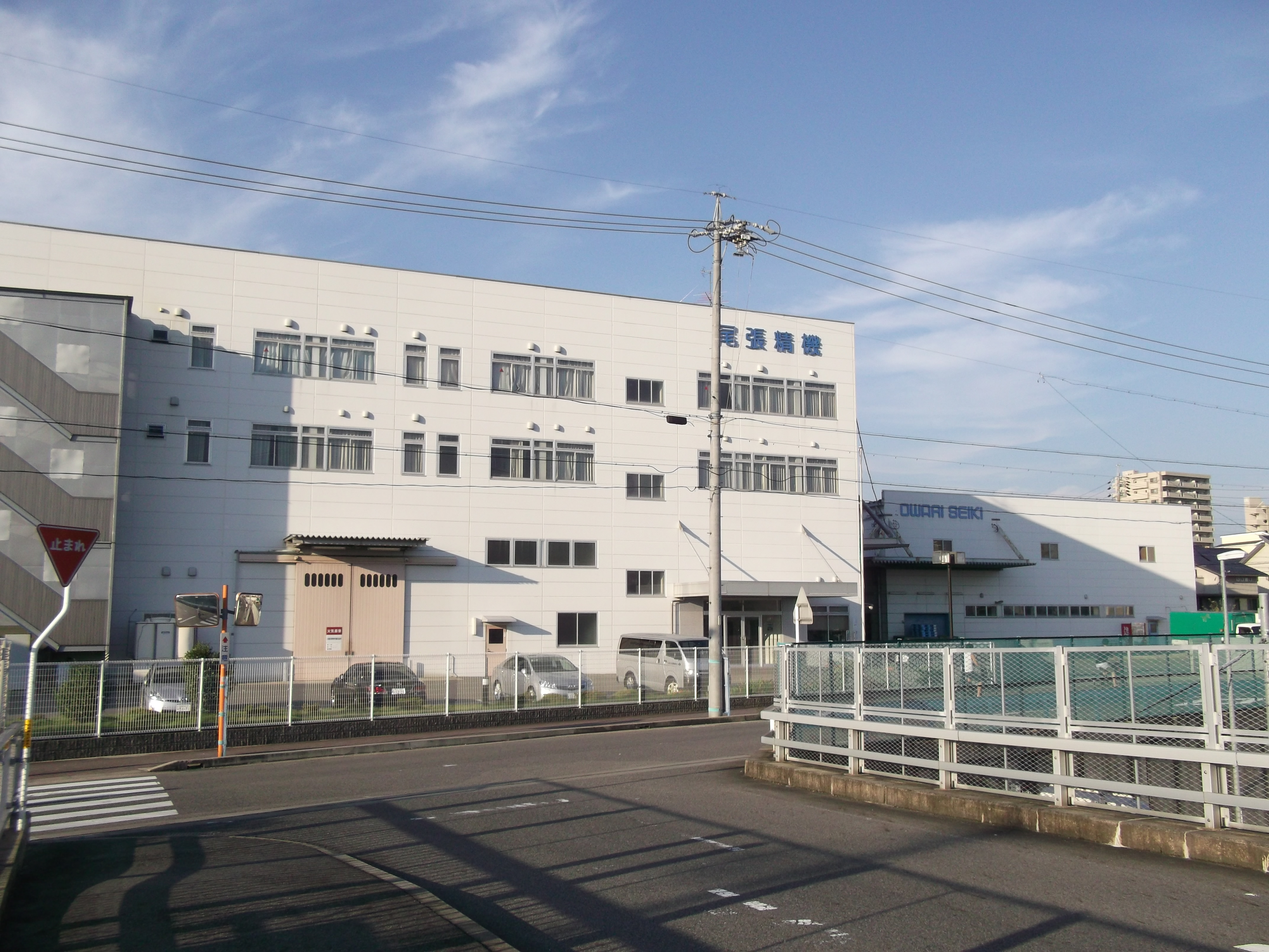 名古屋市東区矢田の尾張精機本社を南側公道より撮影